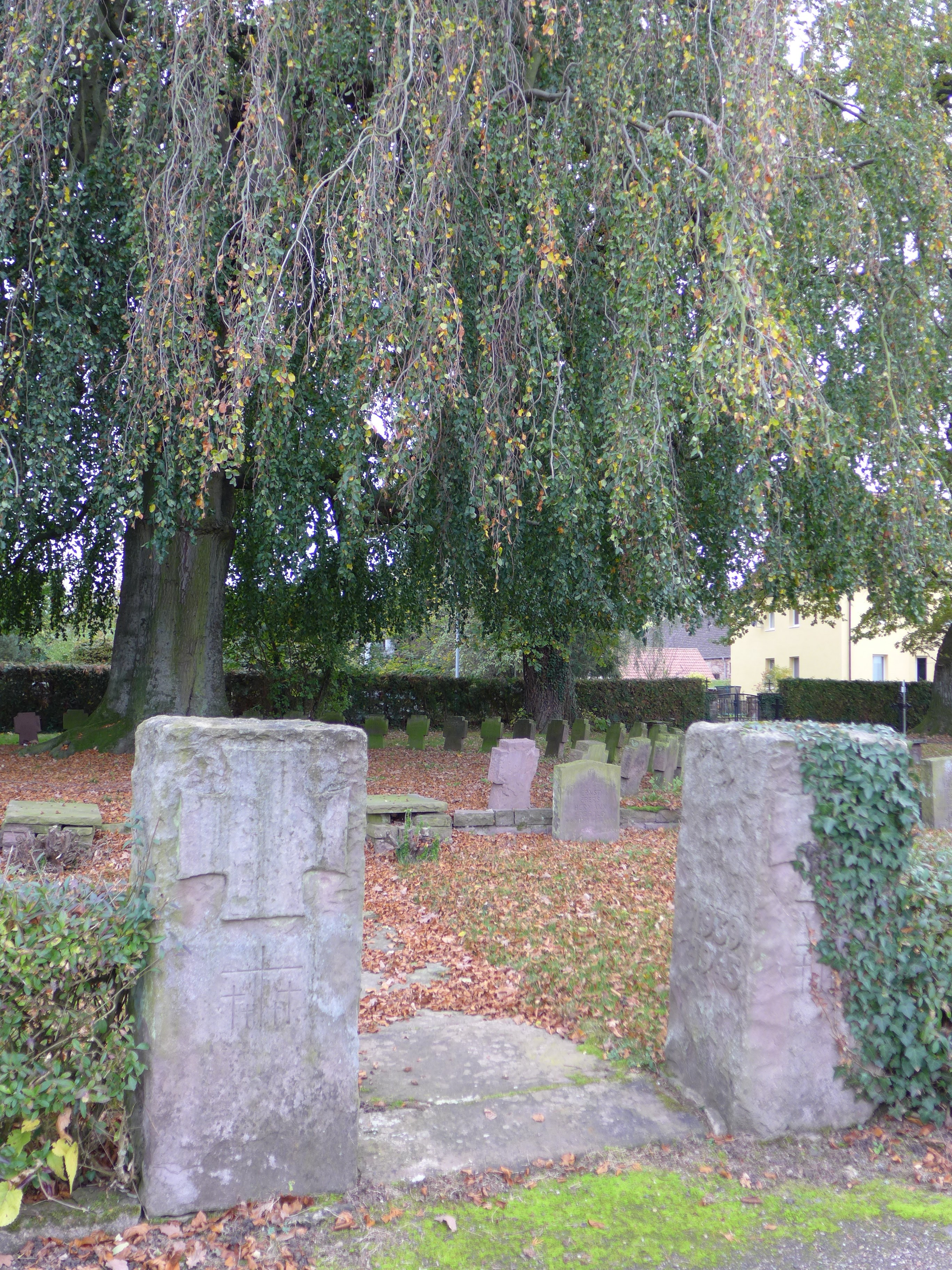 auf dem evangelischen Friehof Lauenförde